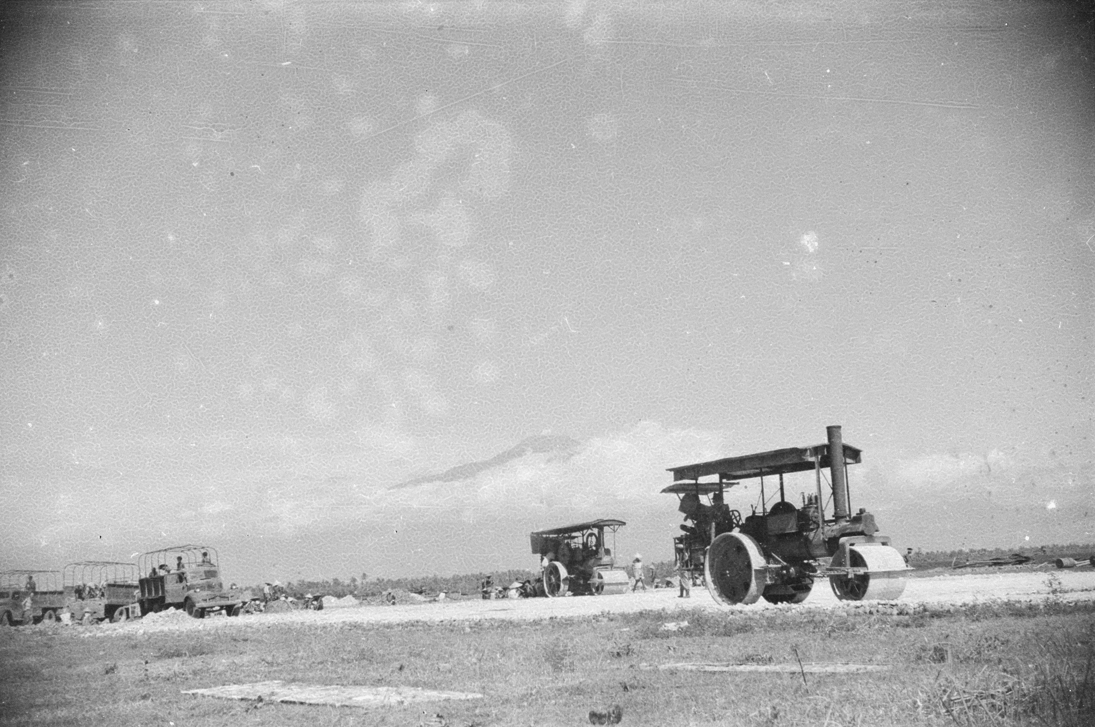 Collectie / Archief : Fotocollectie Dienst voor Legercontacten Indonesië Reportage / Serie : [DLC] Poerwokerto - Banjoemas - Wirasaba Beschrijving : [reparatie en aanleg vliegveld Wirasaba bij Klampok] Datum : 31 januari 1948 Locatie : Indonesië, Nederlands-Indië Fotograaf : Taillie, J.C. / DLC Auteursrechthebbende : Nationaal Archief Materiaalsoort : Negatief (zwart/wit) Nummer archiefinventaris : bekijk toegang 2.24.04.03 Bestanddeelnummer : 1508-1-2